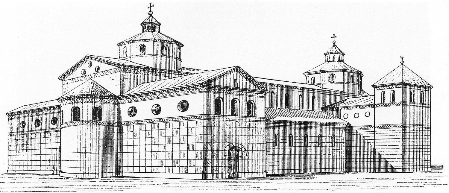 Rekonstruktion des Alten Domes (Vorgänger des Kölner Domes).